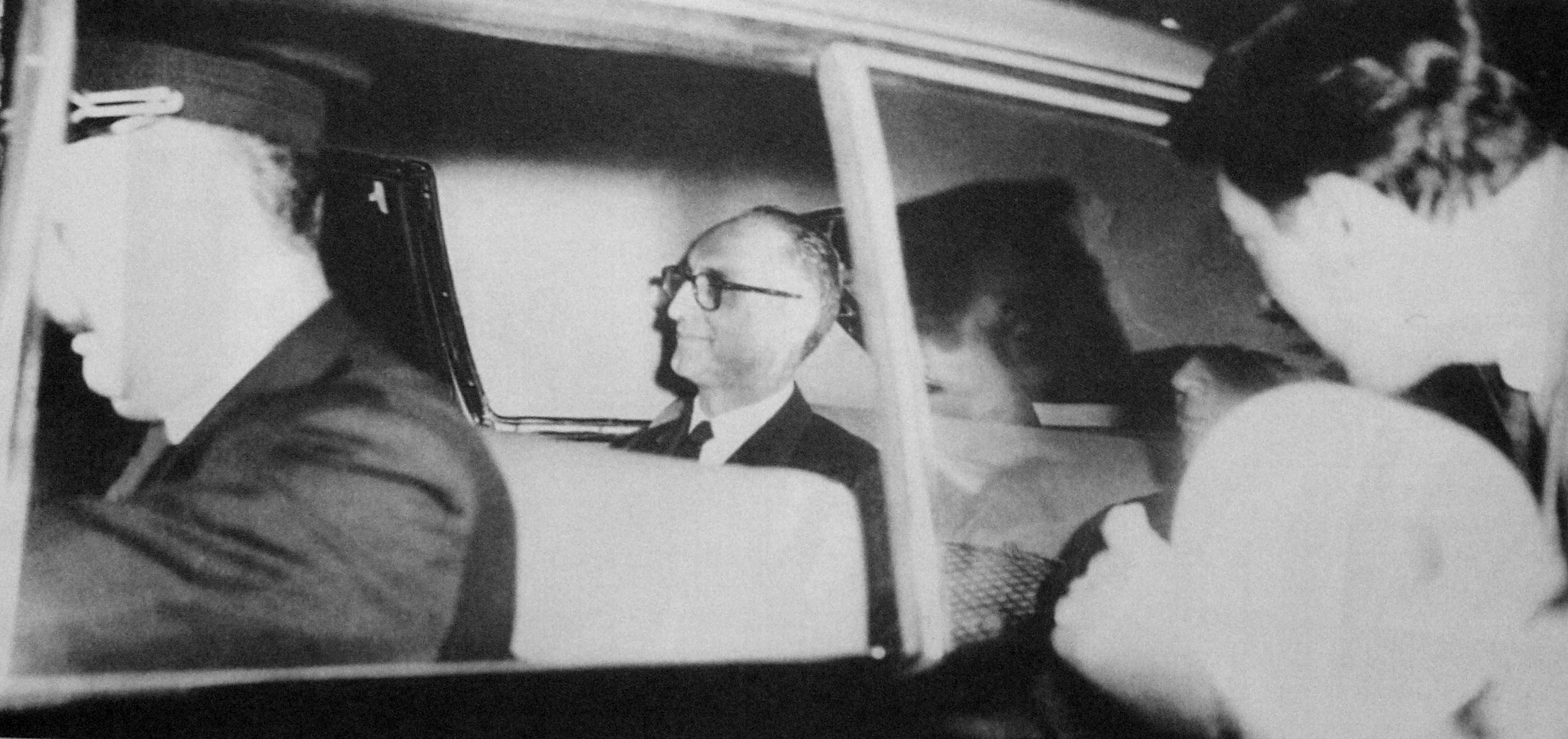 El presidente Arturo Frondizi es llevado preso.